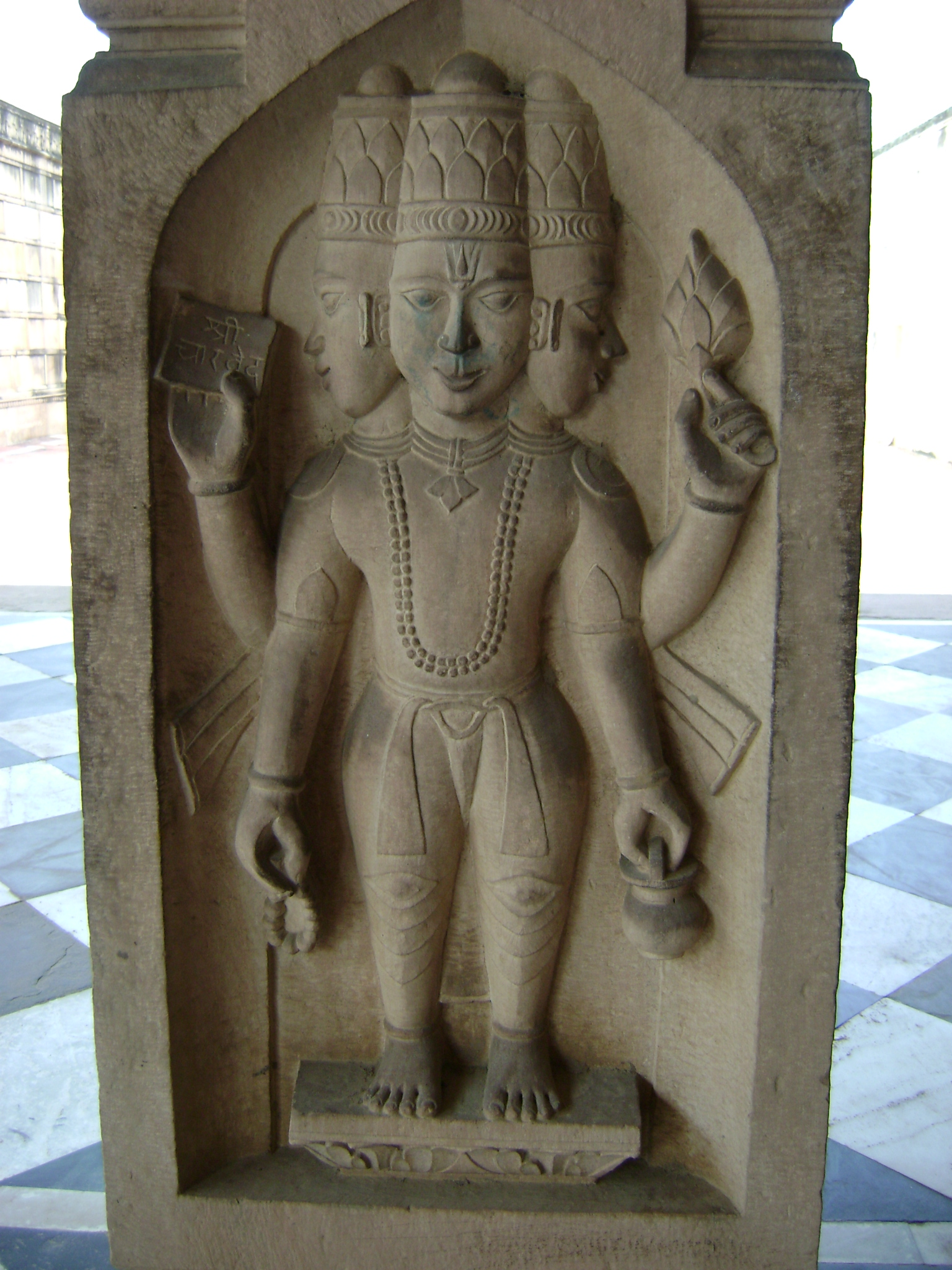 பிருந்தாவனம் கோயில் தூணில் பிரம்மா